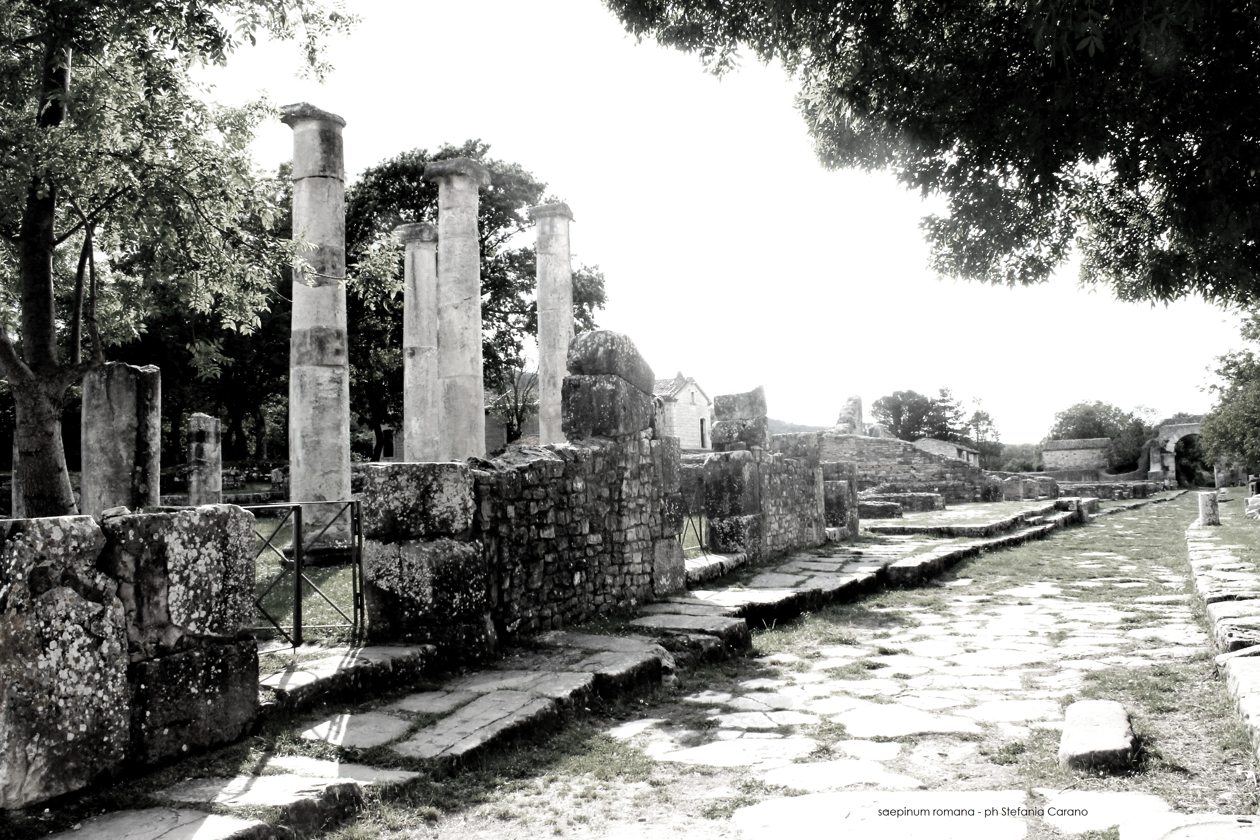 Area archeologica - MIBAC Località Altilia - Sepino (CB) This is a photo of a monument which is part of cultural heritage of Italy.